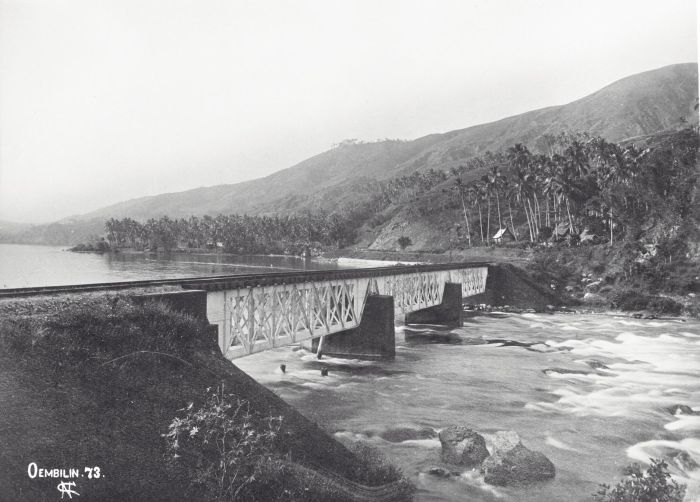 foto. Spoorbrug over de Ombilin rivier, Padangsche Bovenlanden